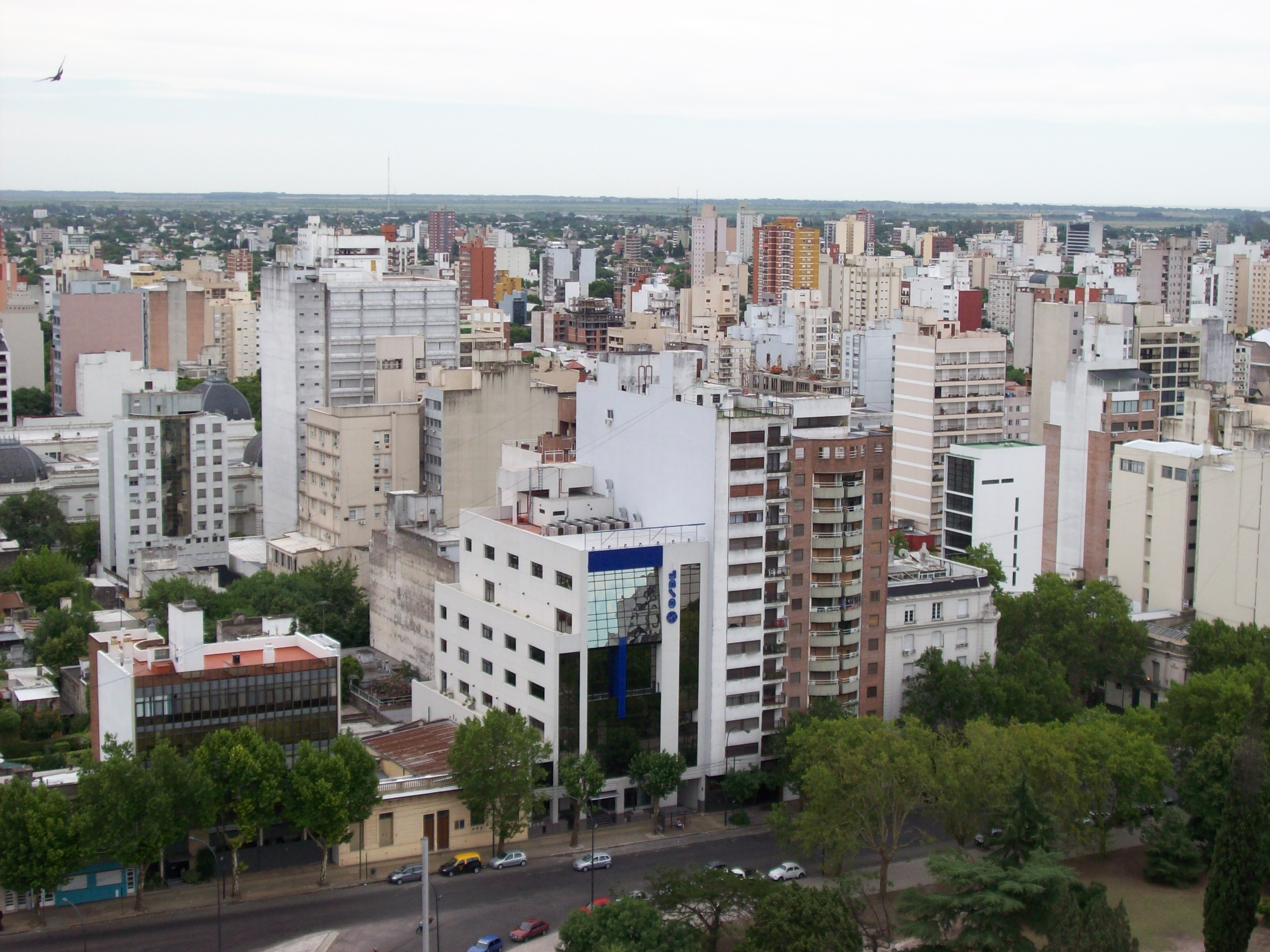 Vista hacia el norte de la Plaza Moreno desde la Torre de Jesús de la Catedral de La Plata a 65 m de altura.